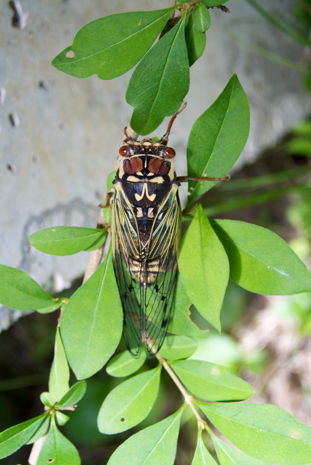 w/ Nikon 1 V1 +11-27.5mm